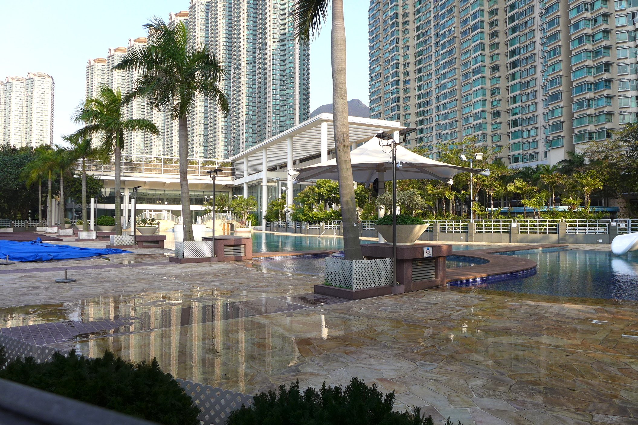 Coastal Skyline Swimming Pool